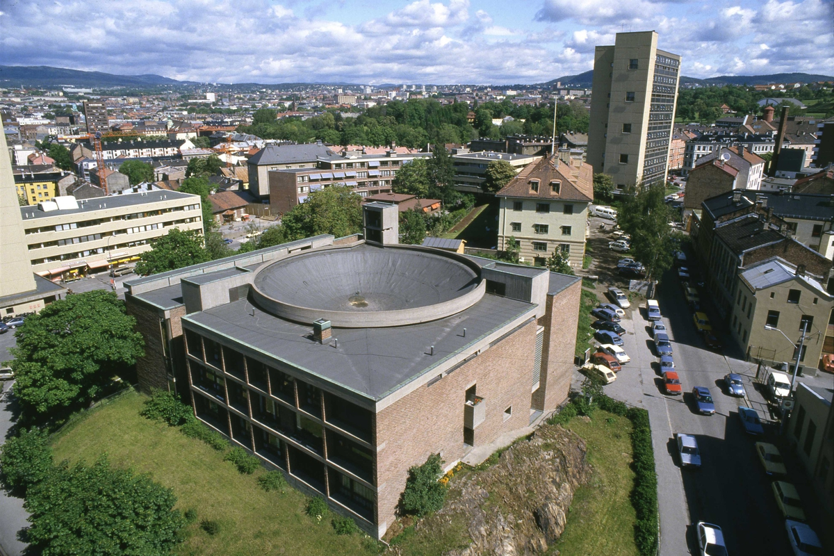 St. Hallvard katolske kirke på Enerhaugen. Foto: Sverre Bergli, ca. 1987–92. Fra Byhistorisk samling hos Oslo Museum.